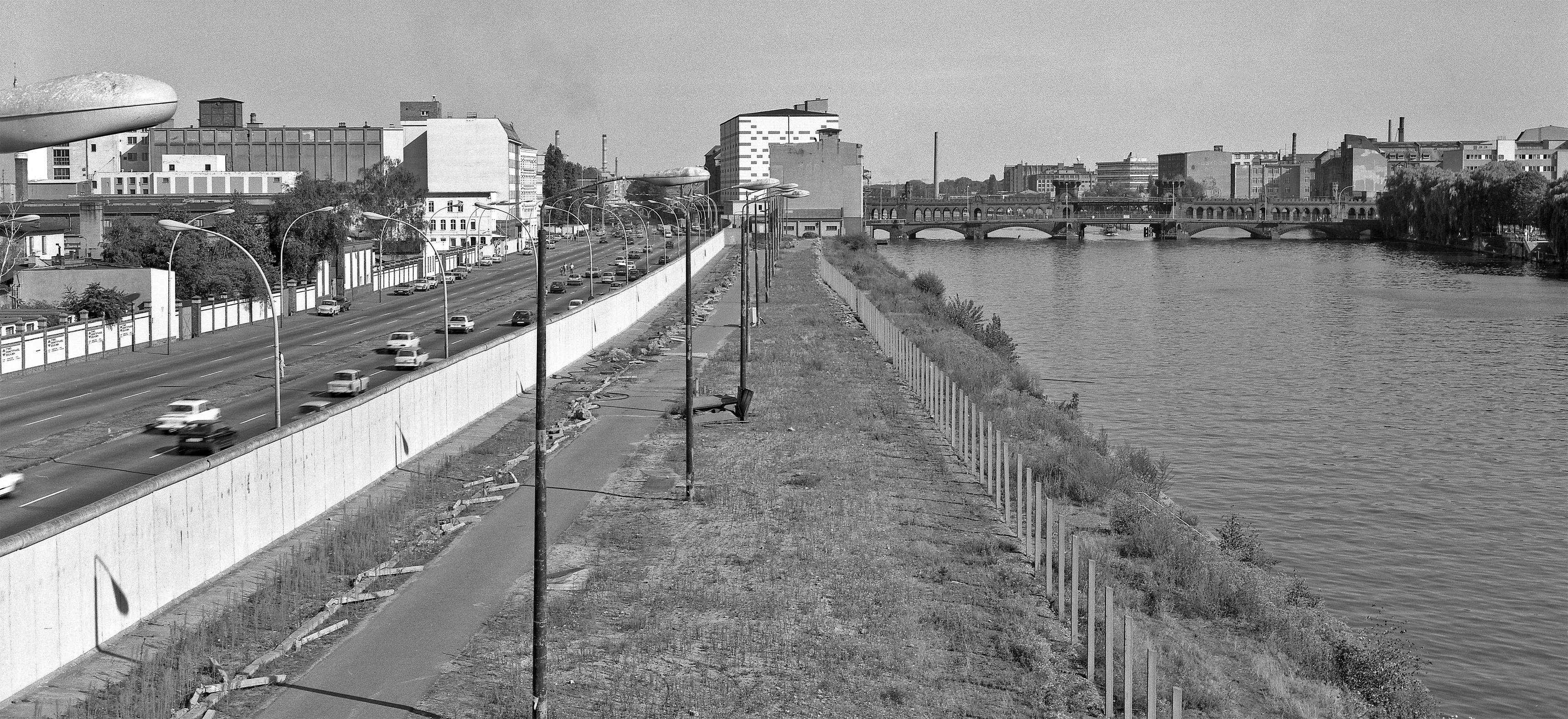 Berlin-Mitte, Mühlenstraße, Oberbaumbrücke